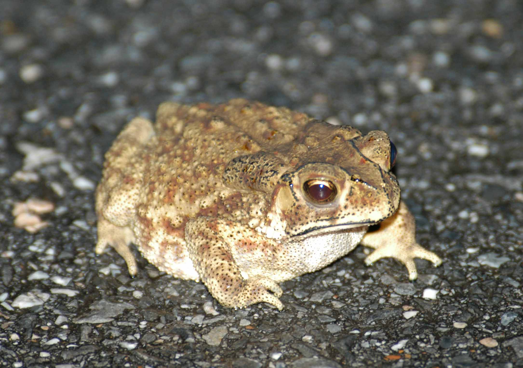 Crapaud masqué, Thaïlande